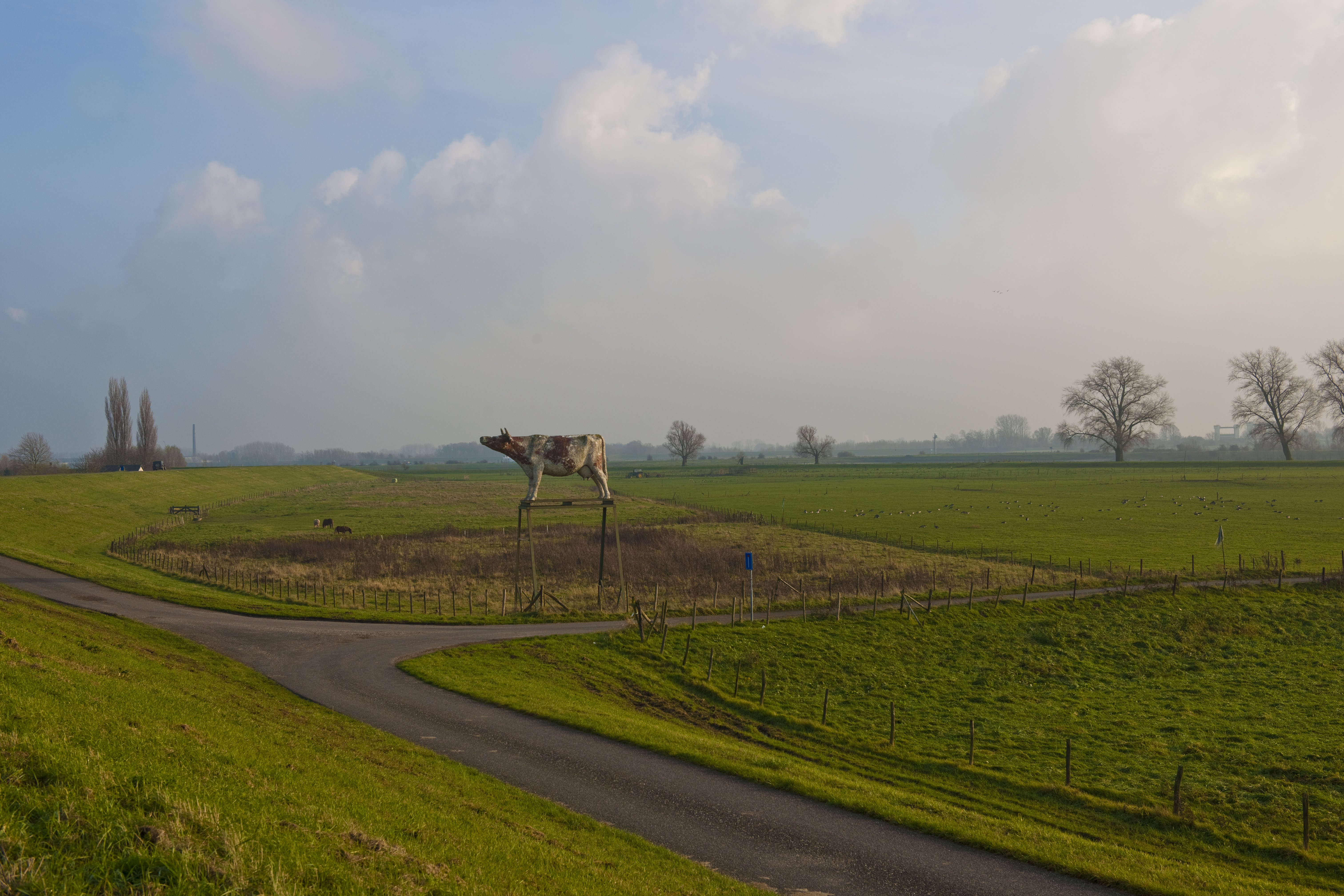 gips staalconstructie